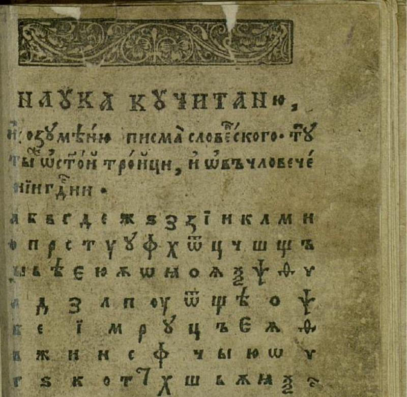 Лаврентий Зизаний «Наука ку читаню и розуменю писма словенскаго»